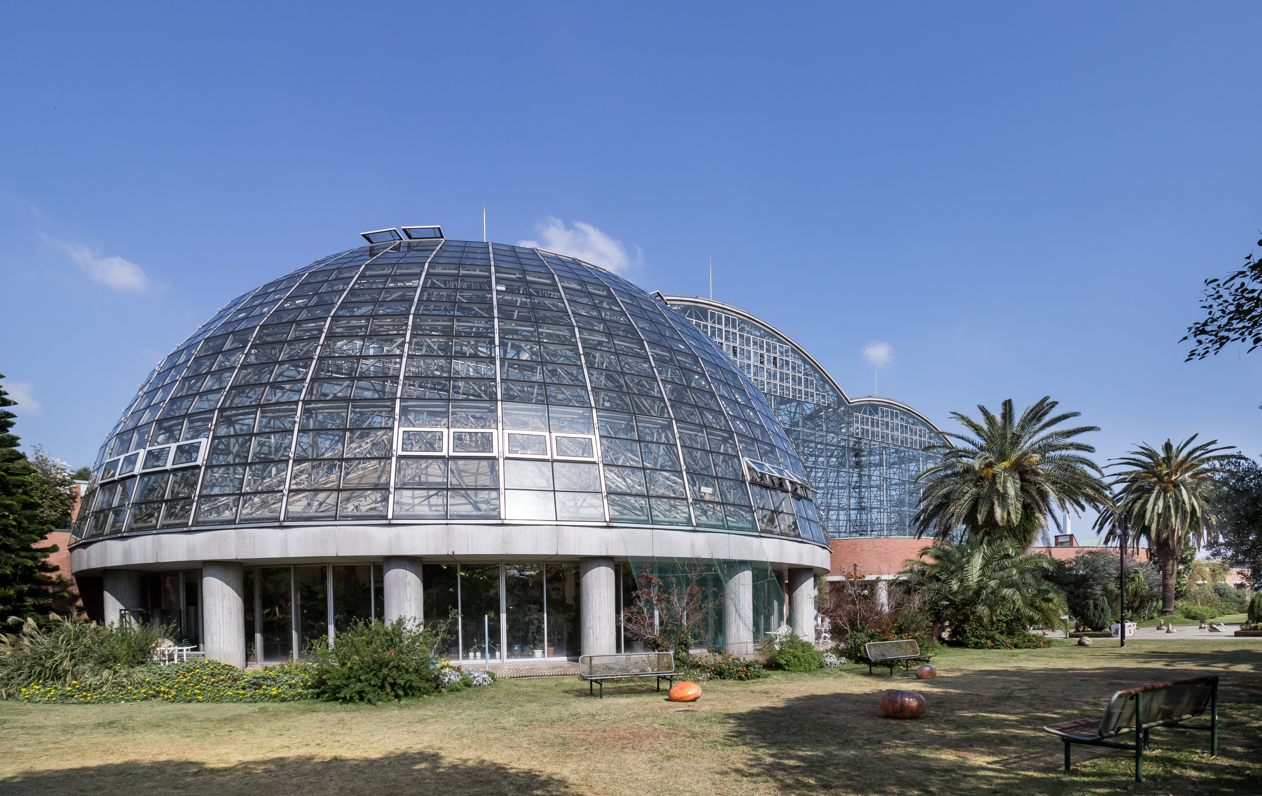 夢の島熱帯植物館(東京都江東区夢の島)。大宇根建築設計事務所設計(1988)